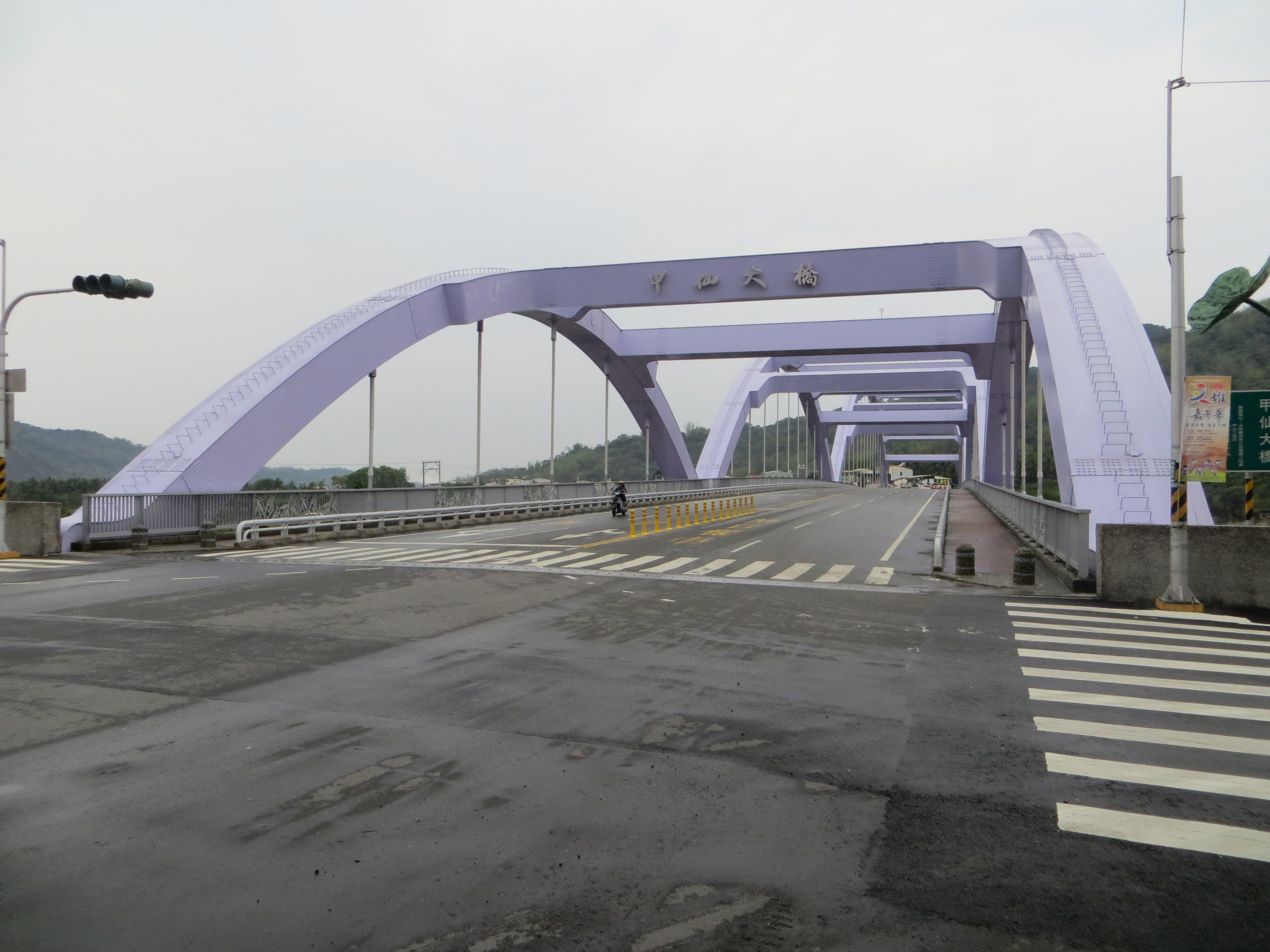 南橫公路於甲仙轄區與台21線共線，同時共經甲仙大橋。圖為朝南化方向攝。2013年4月6日